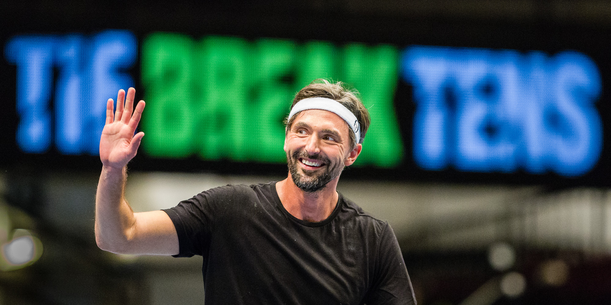 Tie Break Tens in Wien am 23.10.2016 (side event der Erste Bank Open ATP World Tour 500 2016)